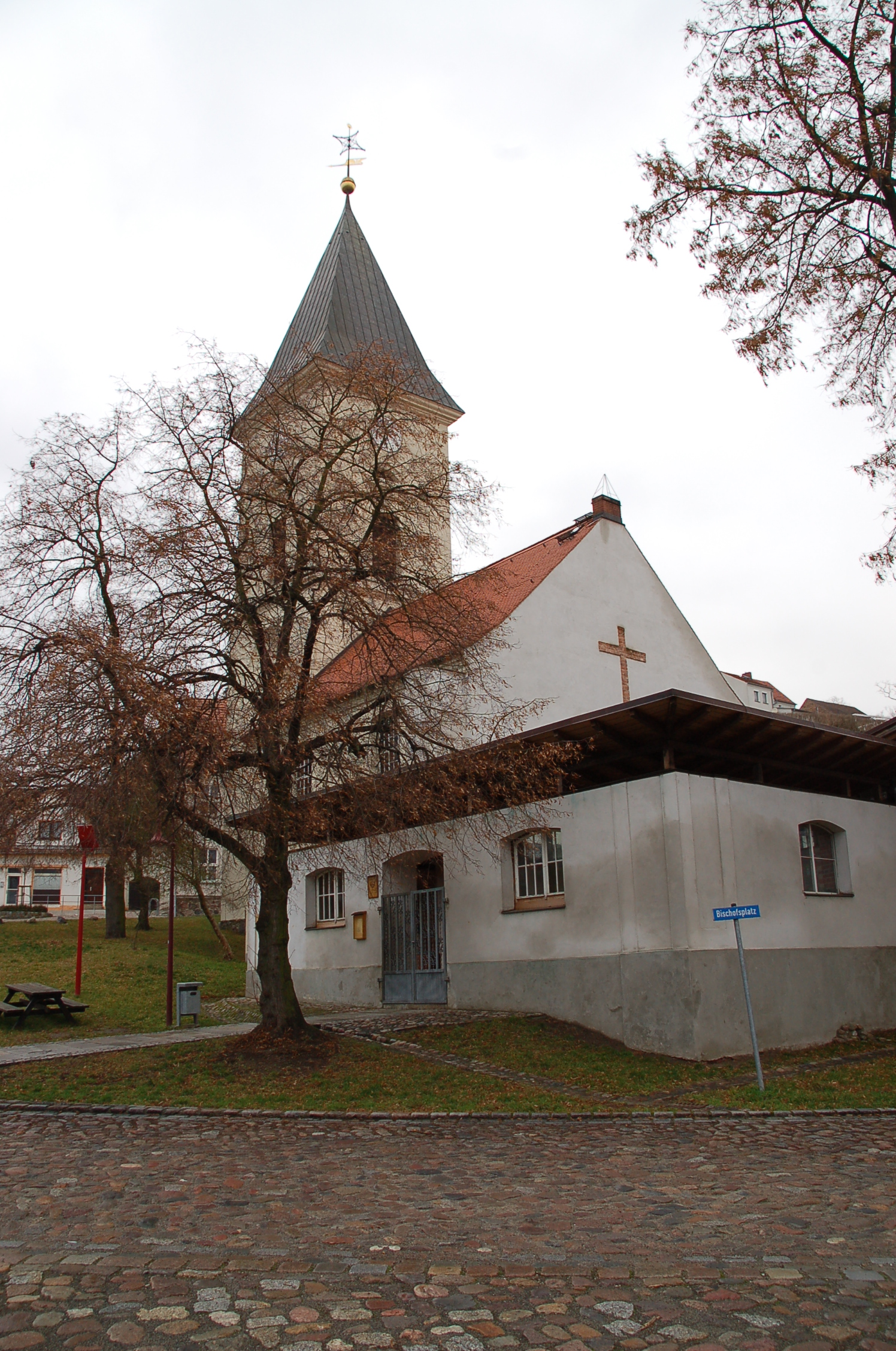 Die evangelische Stadtkirche St. Marien in Lebus